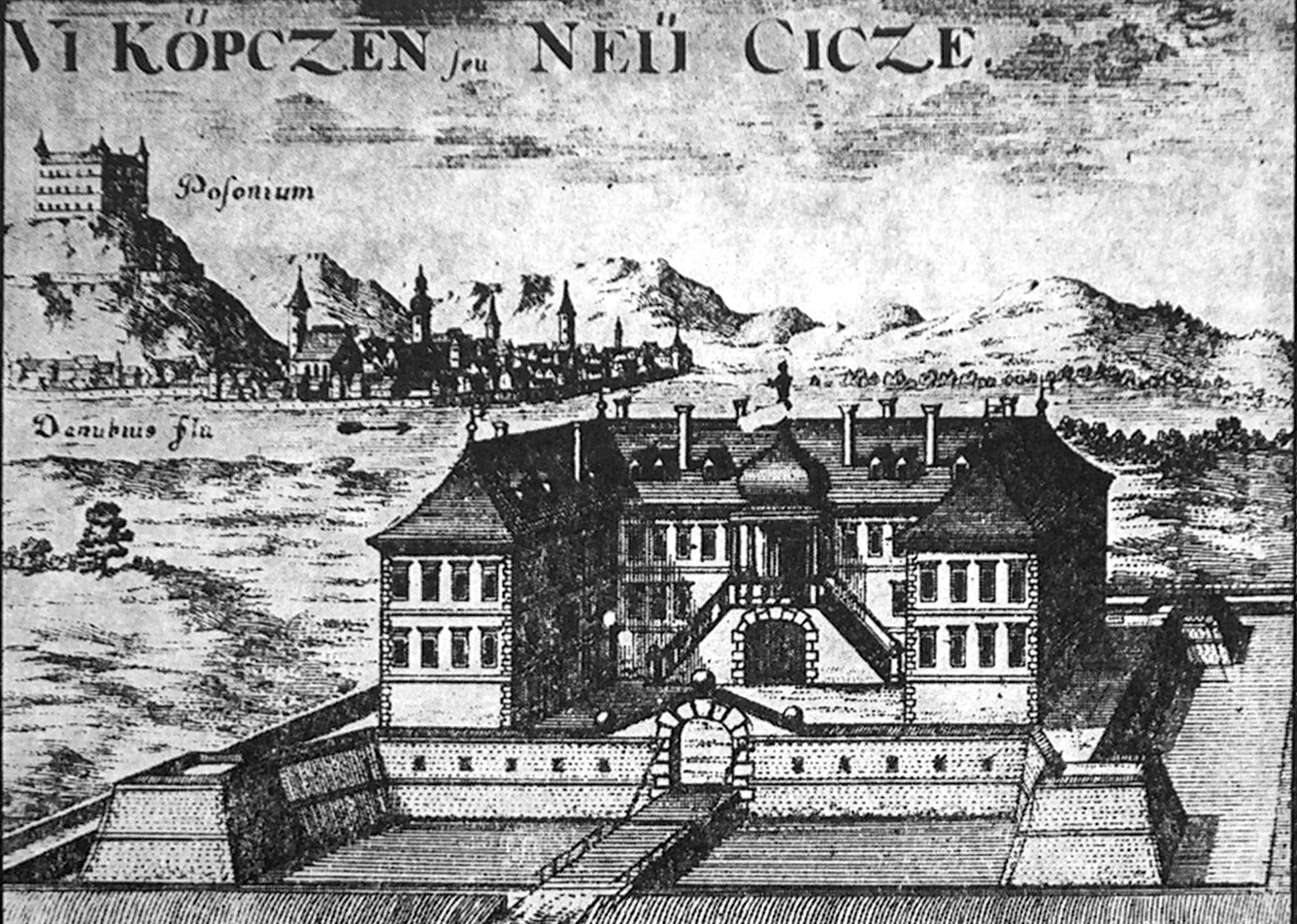 A Pozsony melletti köpcsényi (Kittsee) kastély, M. Greischer metszete, 1680 körül